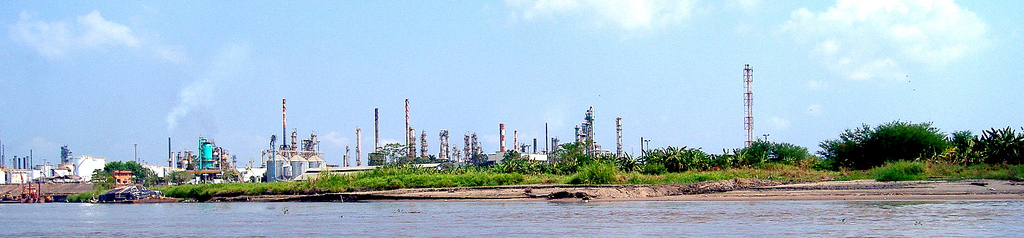 Lo primero que uno mira al salir en chalupa de barranca bermeja